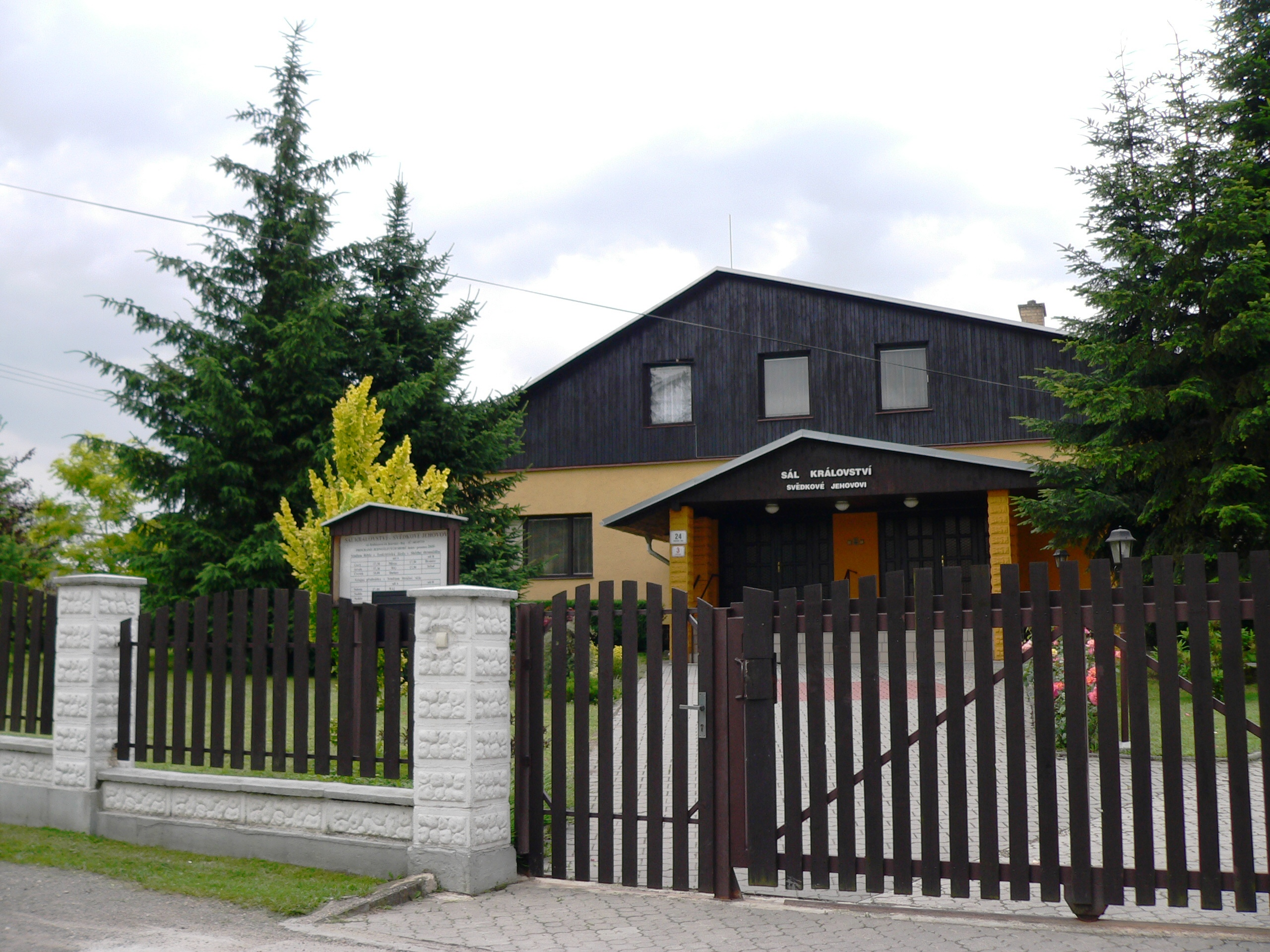 Sál království Svědků Jehovových v Karviné-Ráji.